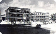 Budowa szkoly